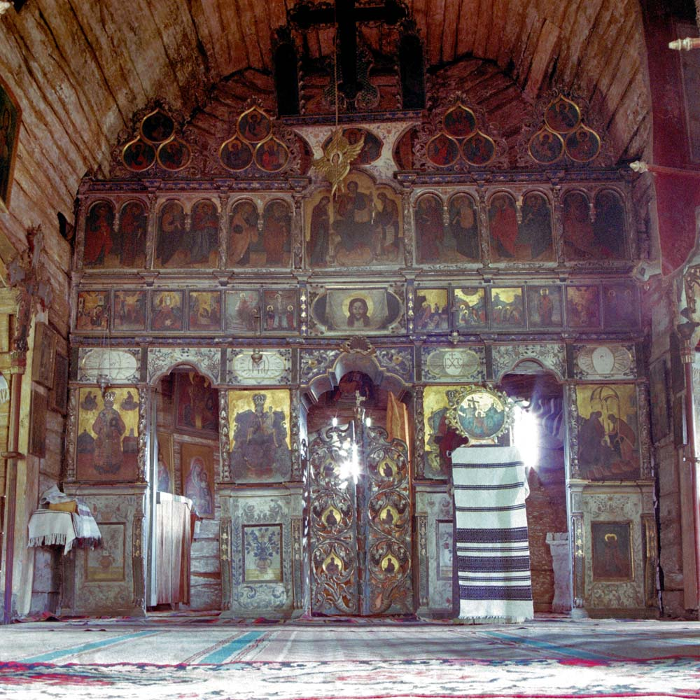 Iconostasul de la 1780 în biserica de lemn din Putna, Suceava.